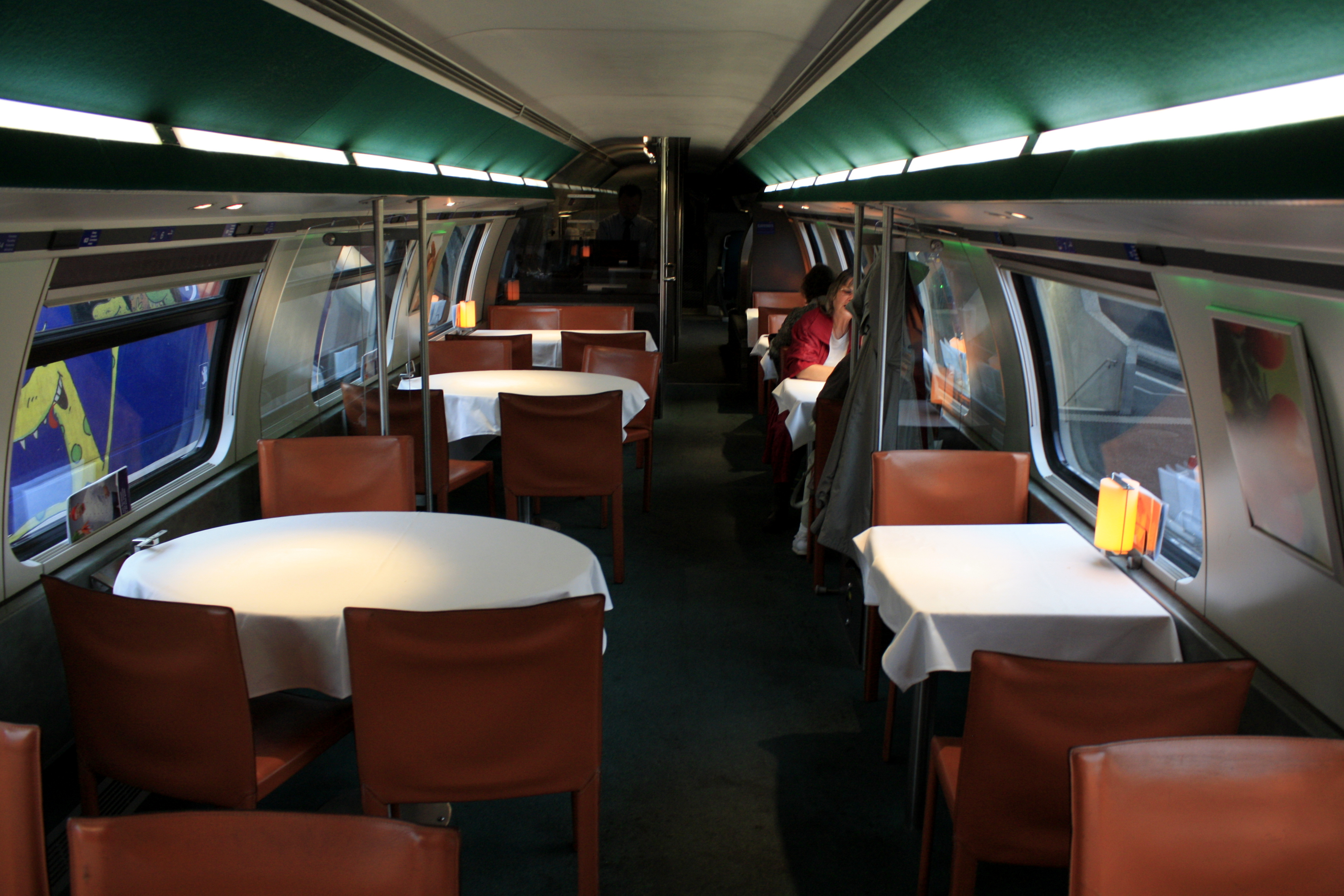 Speiseraum im Oberstock eines IC2000-Speisewagens Typ WRB der SBB